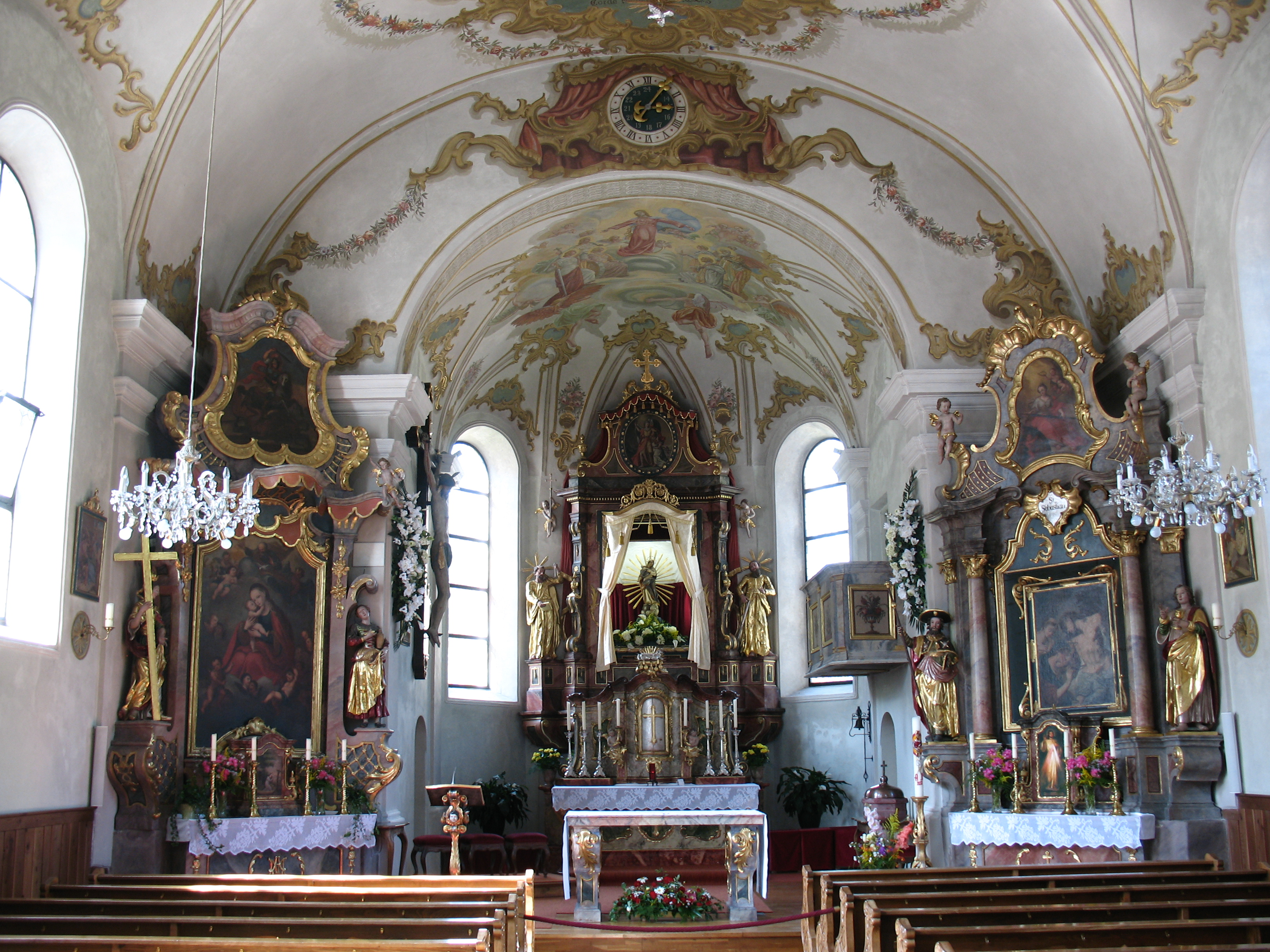 Kath. Pfarrkirche hl. Nepomuk und Friedhof